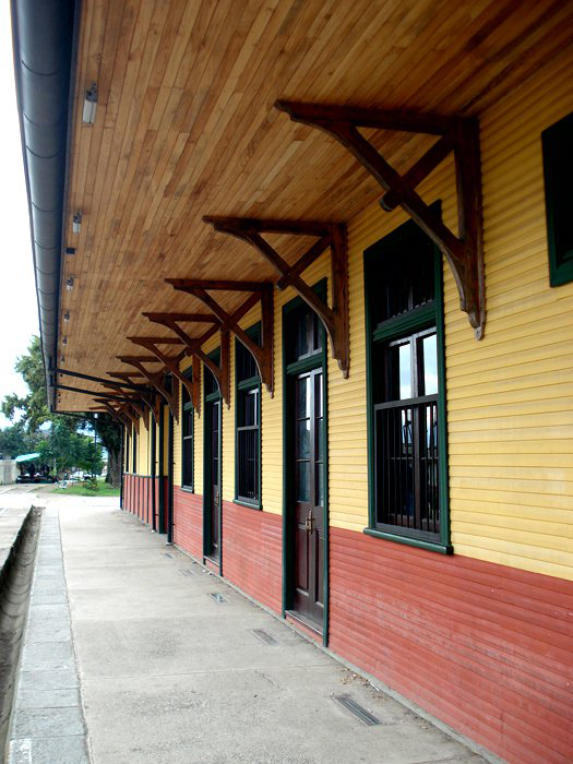 Antigua Estación del Tren, Cartago - Costa Rica